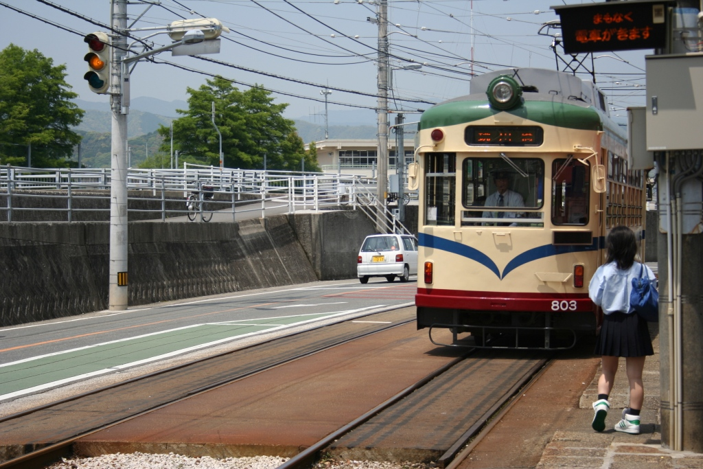 土佐電気鉄道舟戸駅